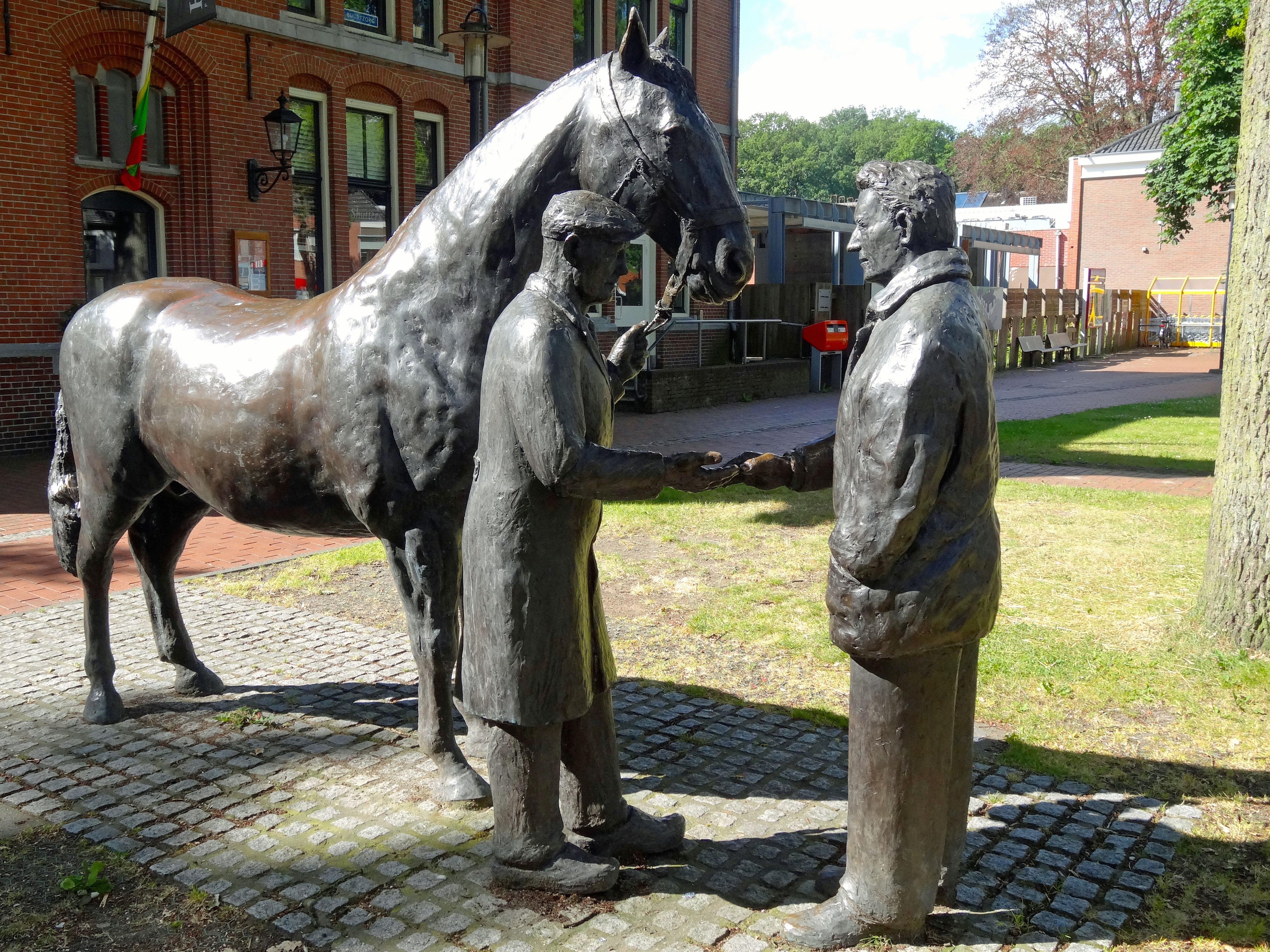 Zuidlaardermarktmonument, beeld van de beeldhouwer Frans Ram